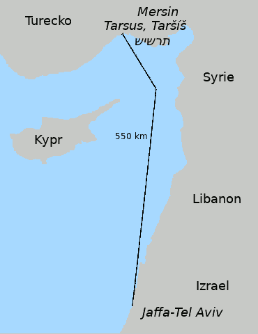 Cesta z Jaffy do Taršíše (Tarsu) v Turecku je dlouhá 550 km.